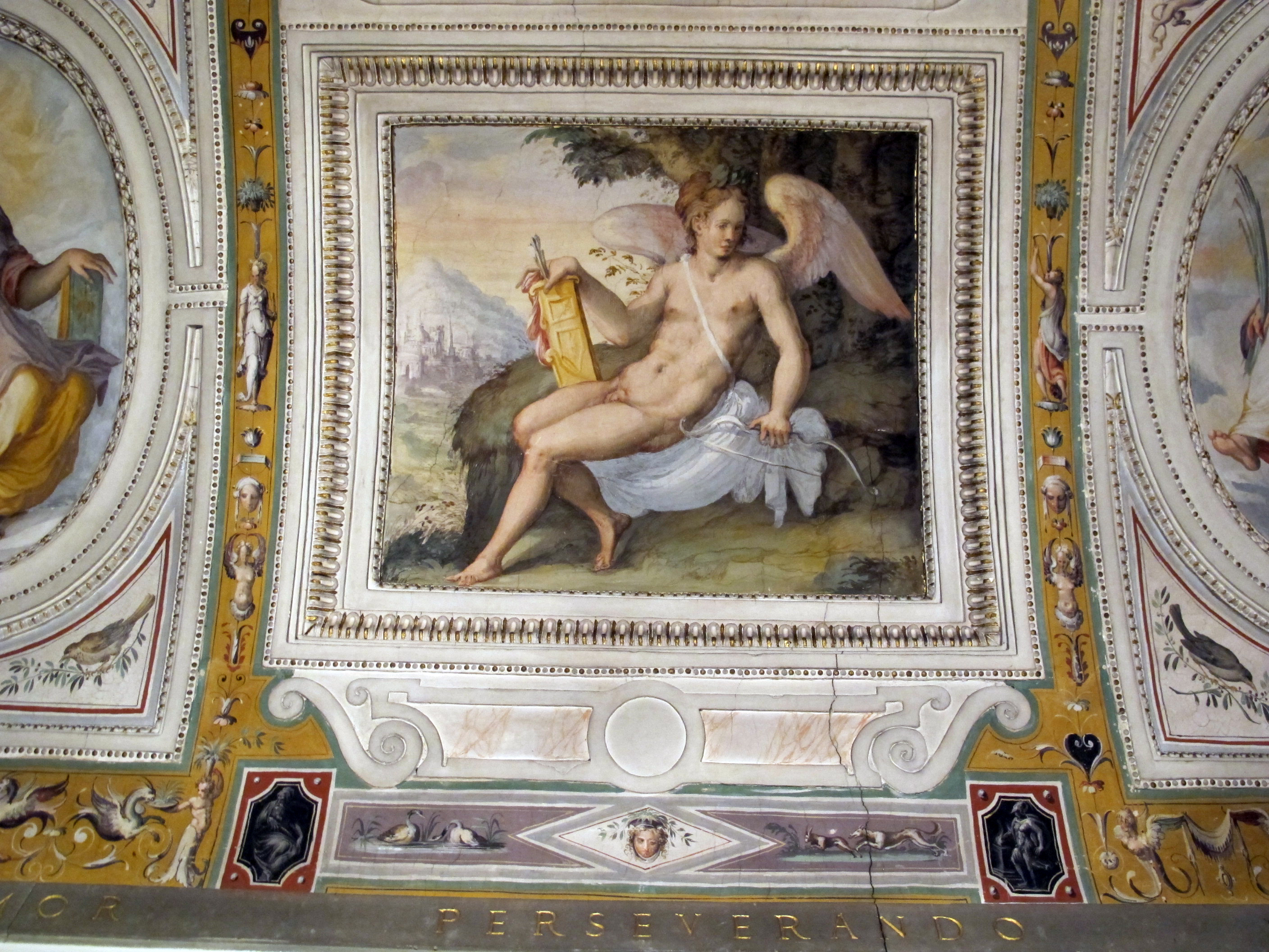 Palazzo di sforza almeni, sala con affreschi, figura allegorica